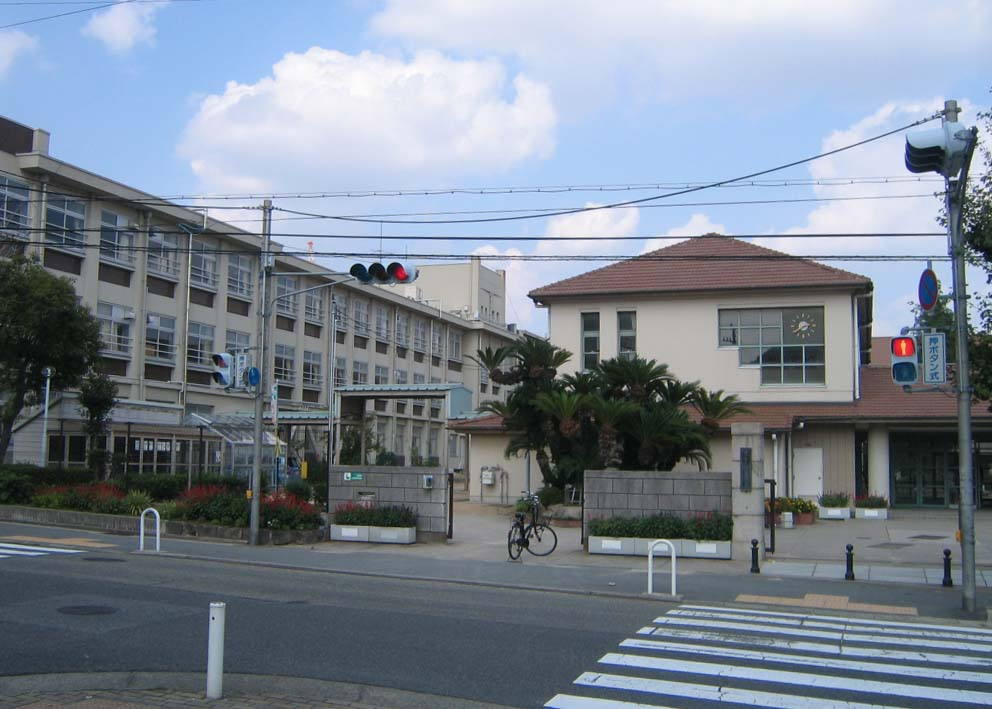 神戸市立住吉小学校。兵庫県神戸市東灘区住吉東町四丁目1番31号